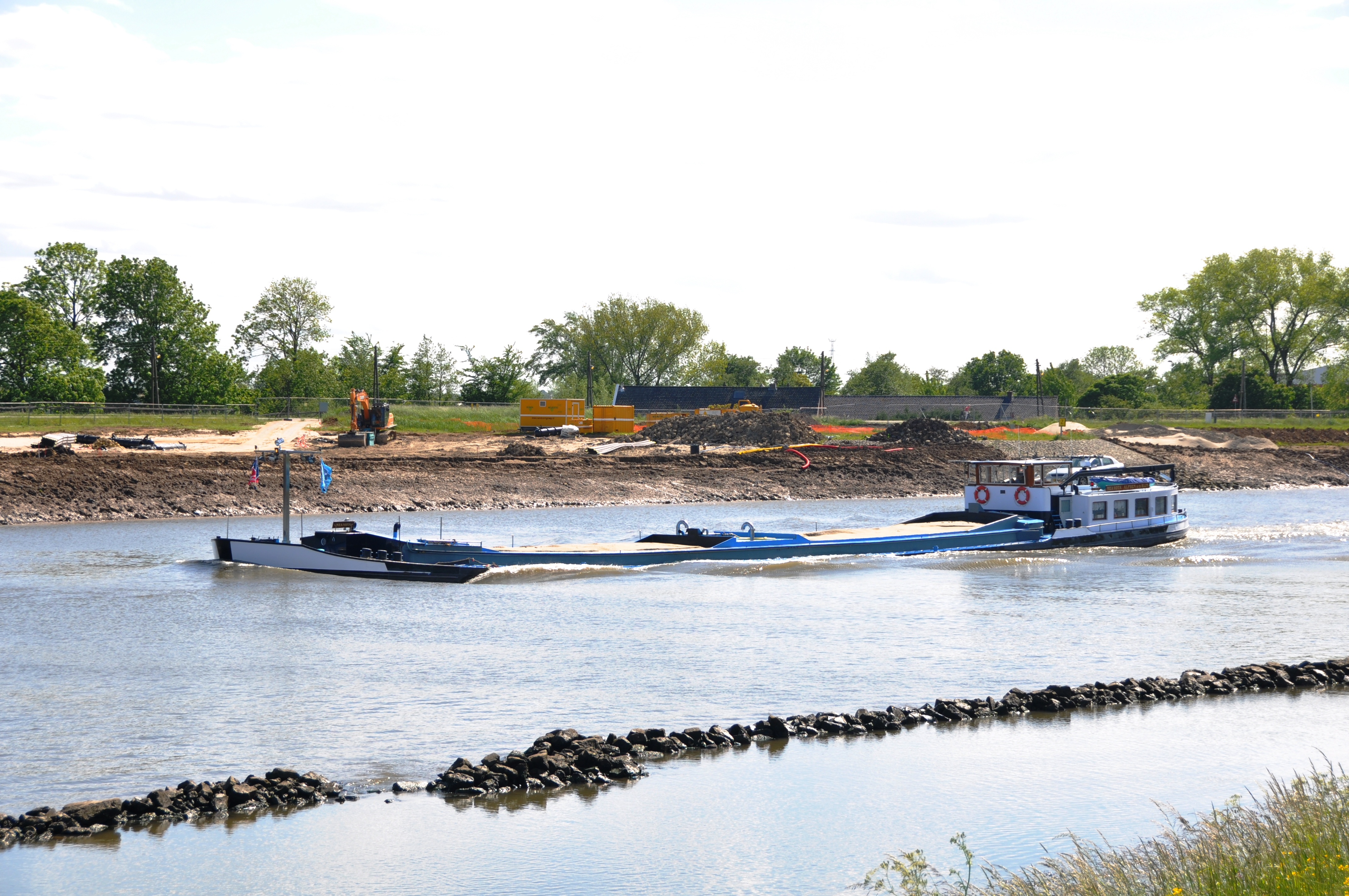 De MEA VOTA opvarend op de Hollandsche IJssel.